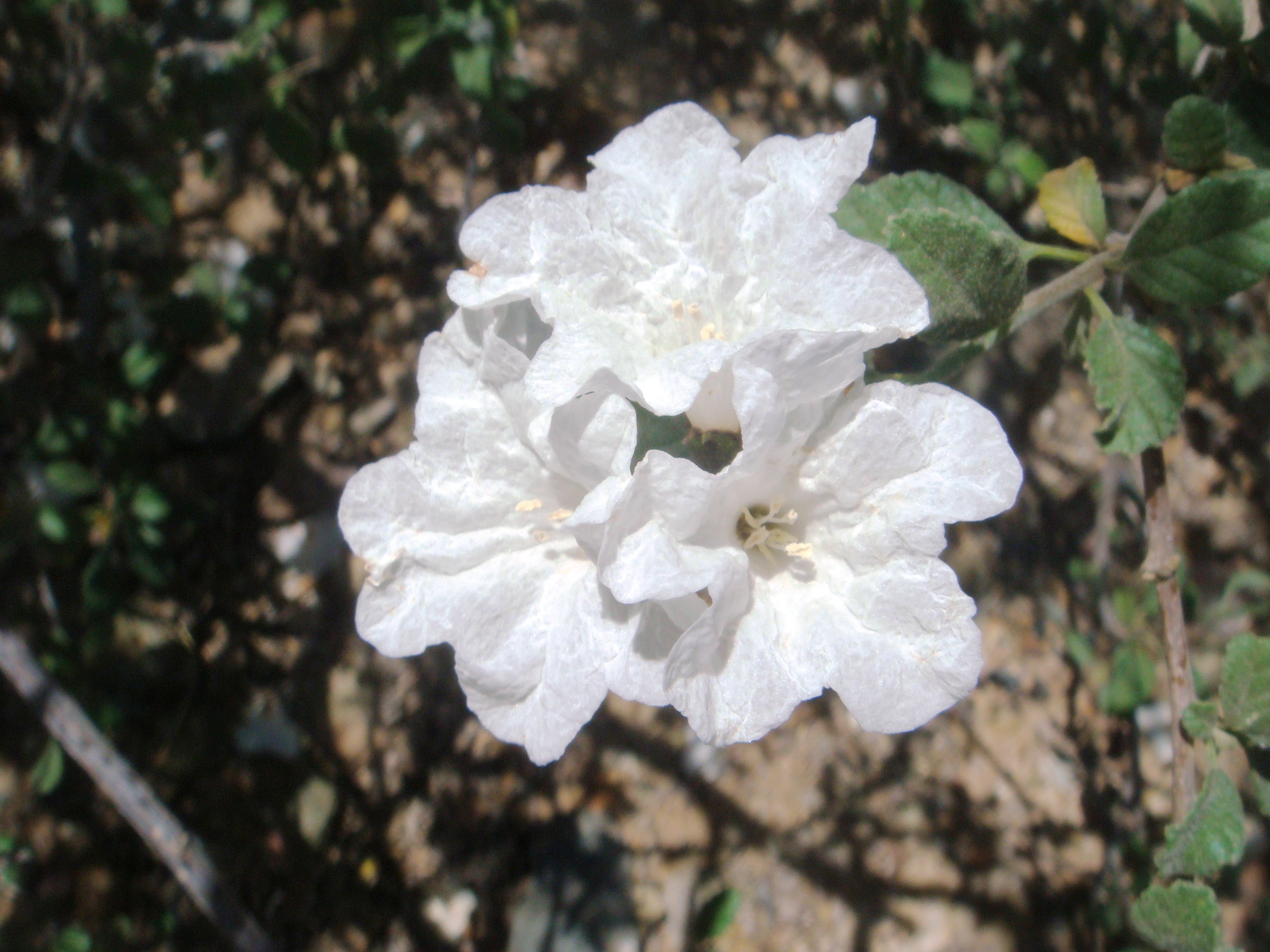 Cordia parvifolia, cultivated, Arizona State University, Tempe, Arizona